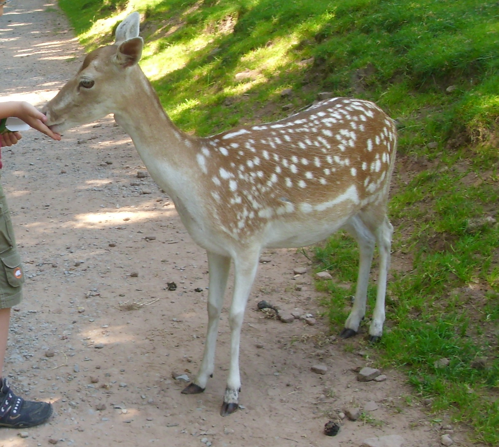 Wildpark Gersfeld Füttern von Damwild im Freigehege